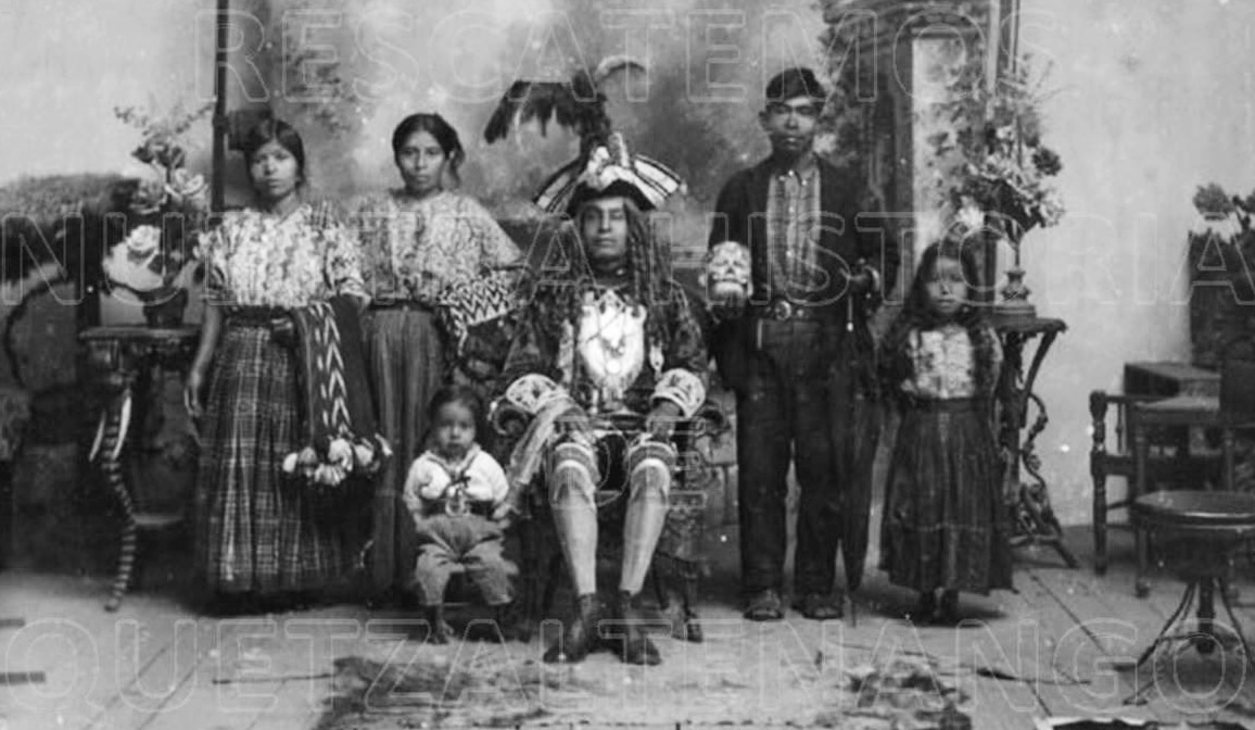 Familia quetzalteca en la década de 1890. El padre de familia está vestido para participar en el Baile de la Conquista.